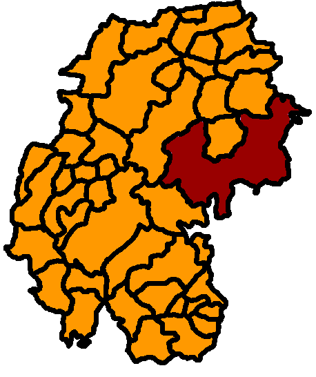 Ilmtal hervorgehoben, Ilm-Kreis